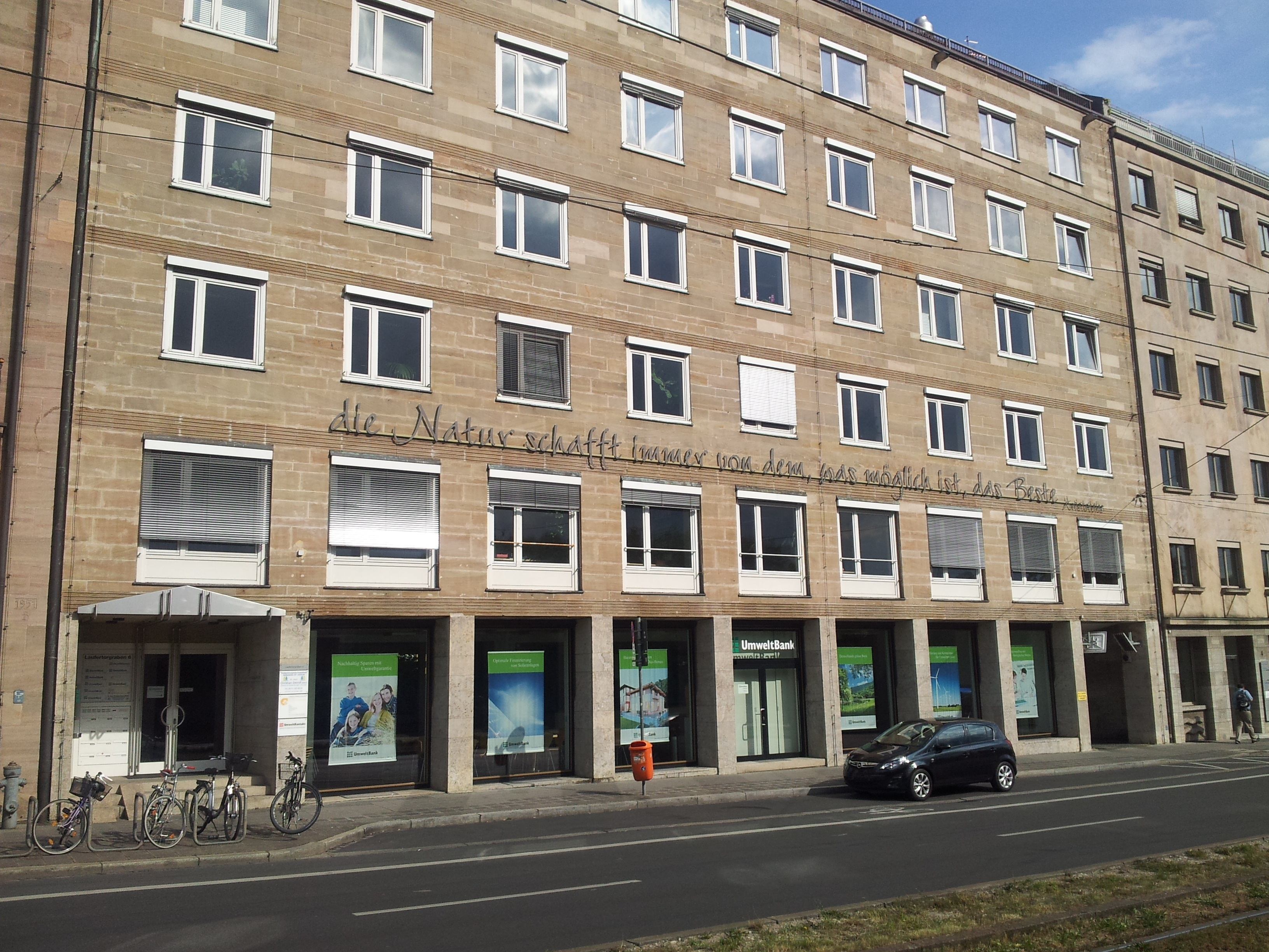 Nürnberg Laufertorgraben 6 Umweltbank